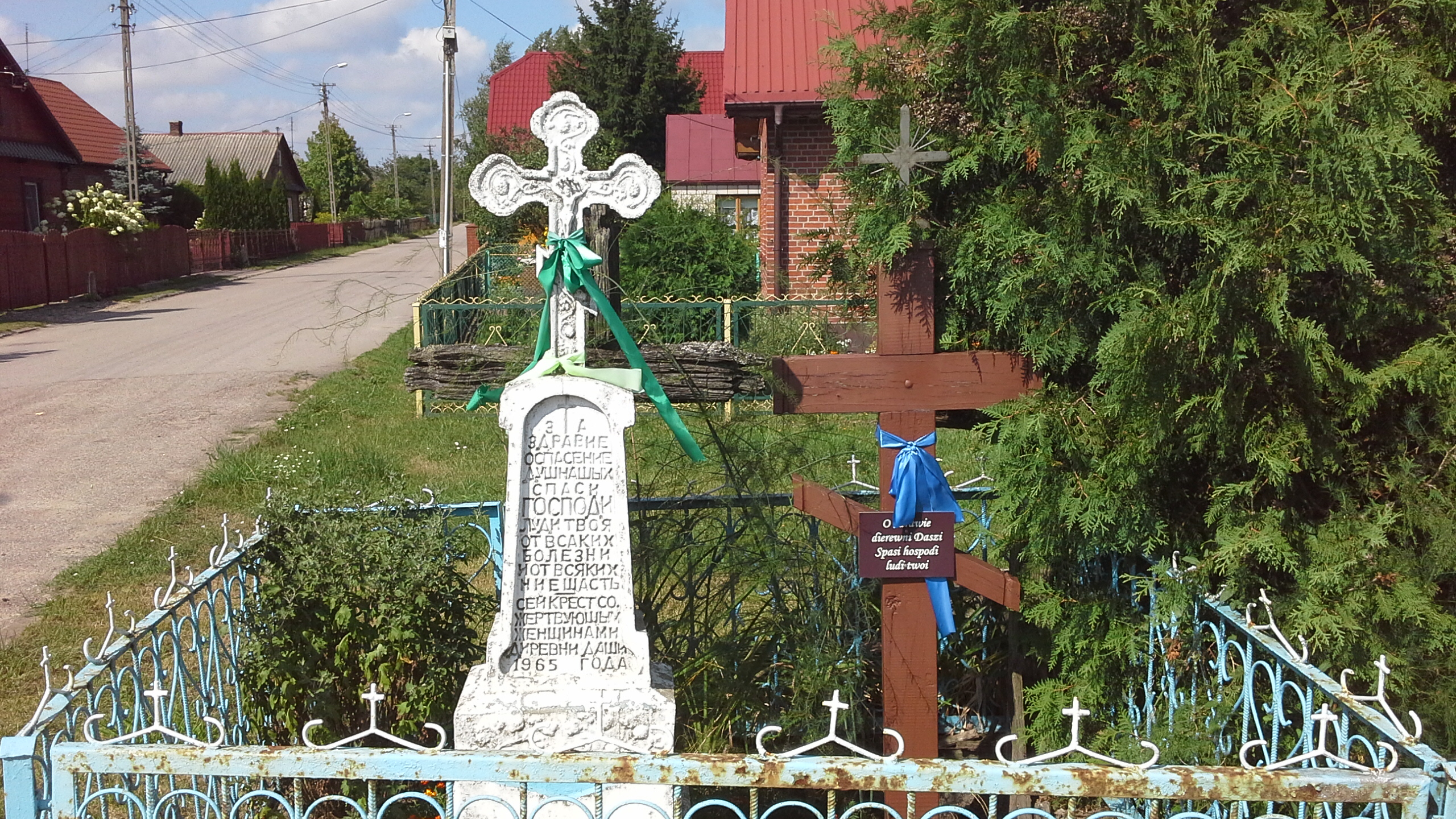 Krzyże wotywne w centrum wsi Dasze